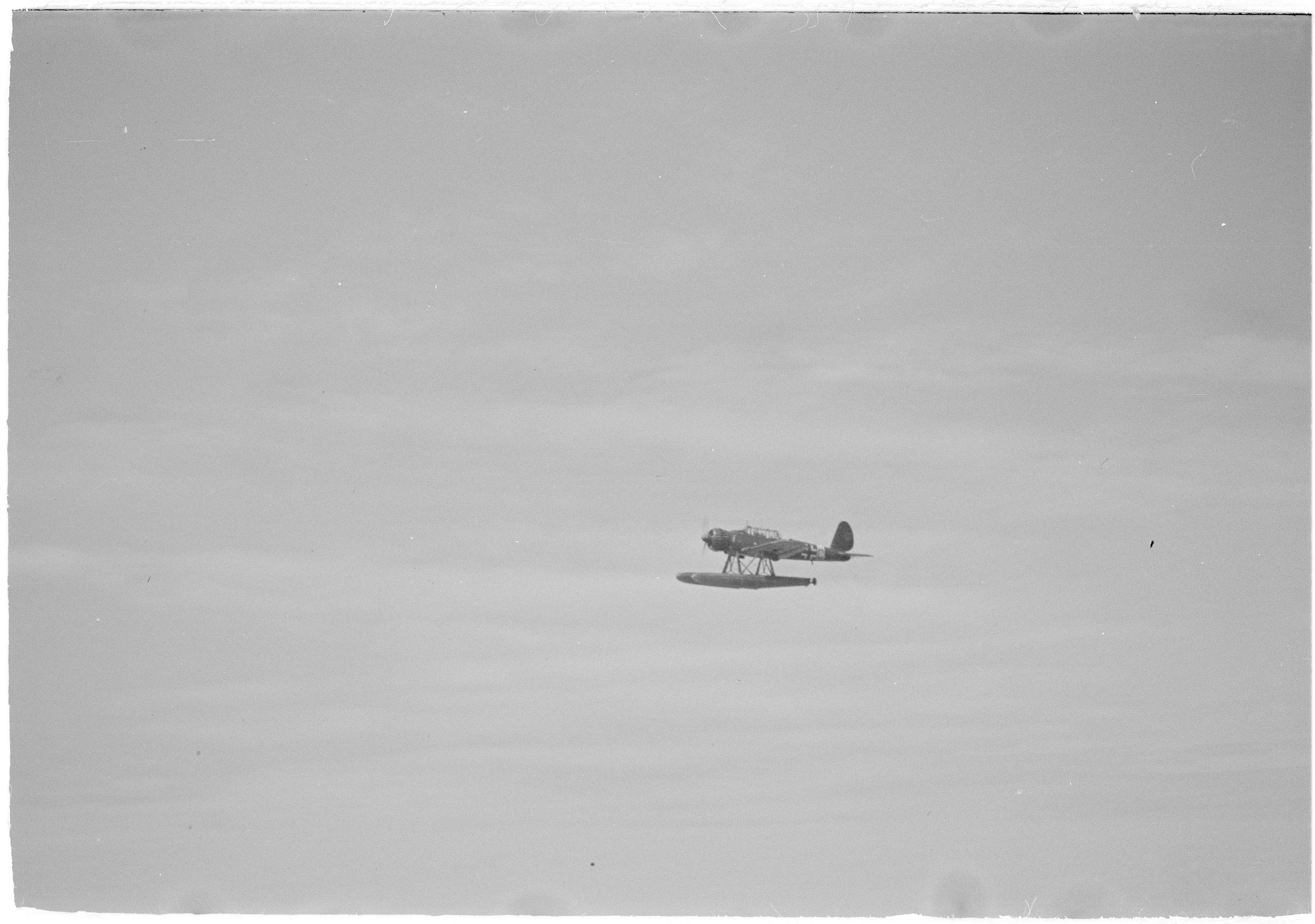 Lentokone suorittamassa sukellusveneen etsintää. (Kuvassa on saksalainen Arado Ar 196) Kuvauspaikka: Porkkala